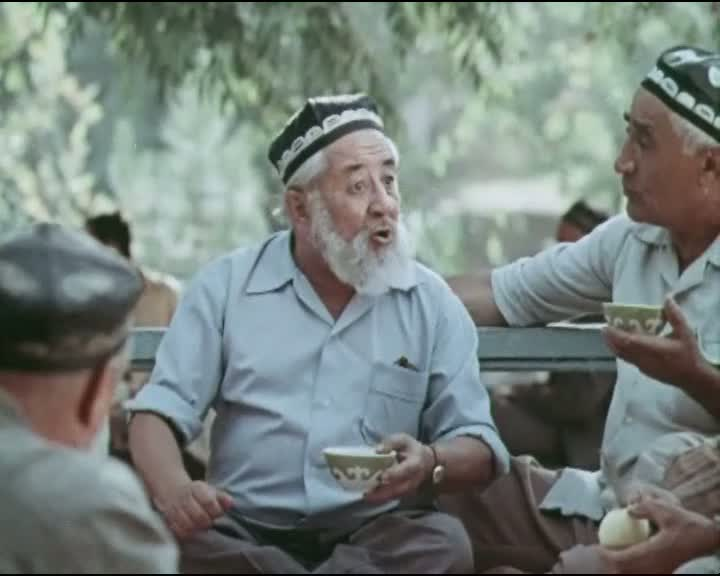 Тоҷикӣ: Самар Саъдиев лаҳза аз филми "Тӯфон дар води", - киностудияи Тоҷикфилм